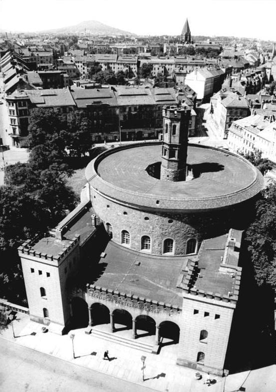 Görlitz, Kaisertrutz ADN-ZB Hiekel 1.7.1983 Bez. Dresden: Görlitz-Der Kaisertrutz erhielt im Dreißgjährigen Krieg seinen Namen, als hier die Verteidiger den anstürmenden kaiserlichen Truppen trotzten. Heute birgt das Gebäude den Teil der Städtischen Kunstsammlungen, der sich mit der Darstellung der Stadtgeschichte befaßt, sowie eine Gemäldegalerie mit Werken von vorwiegend der Oberlausitz verbundenen Künstlern. - siehe auch 1983-0701-010 und 1983-0701-012